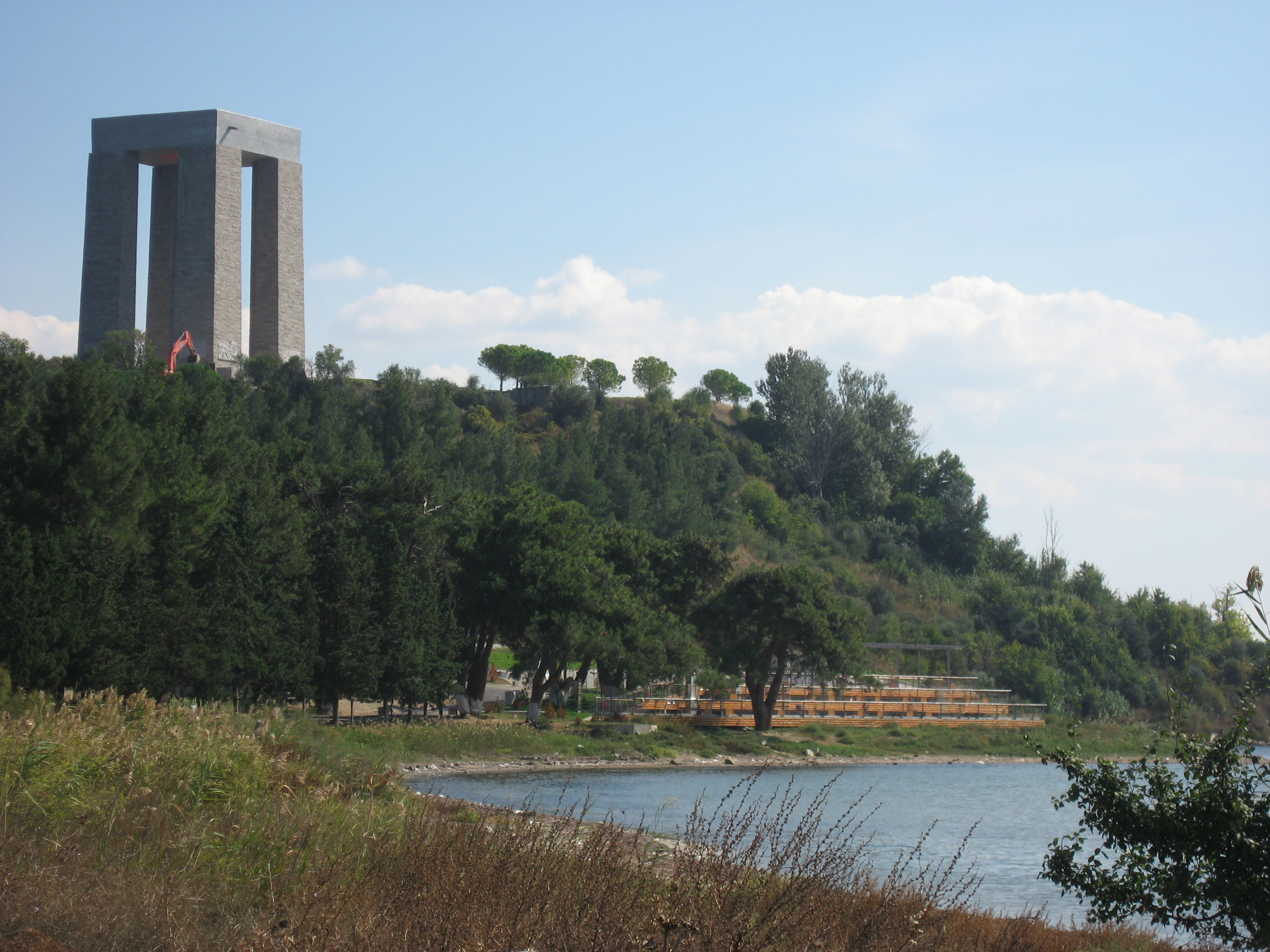 Çanakkale Martyrs' Memorial